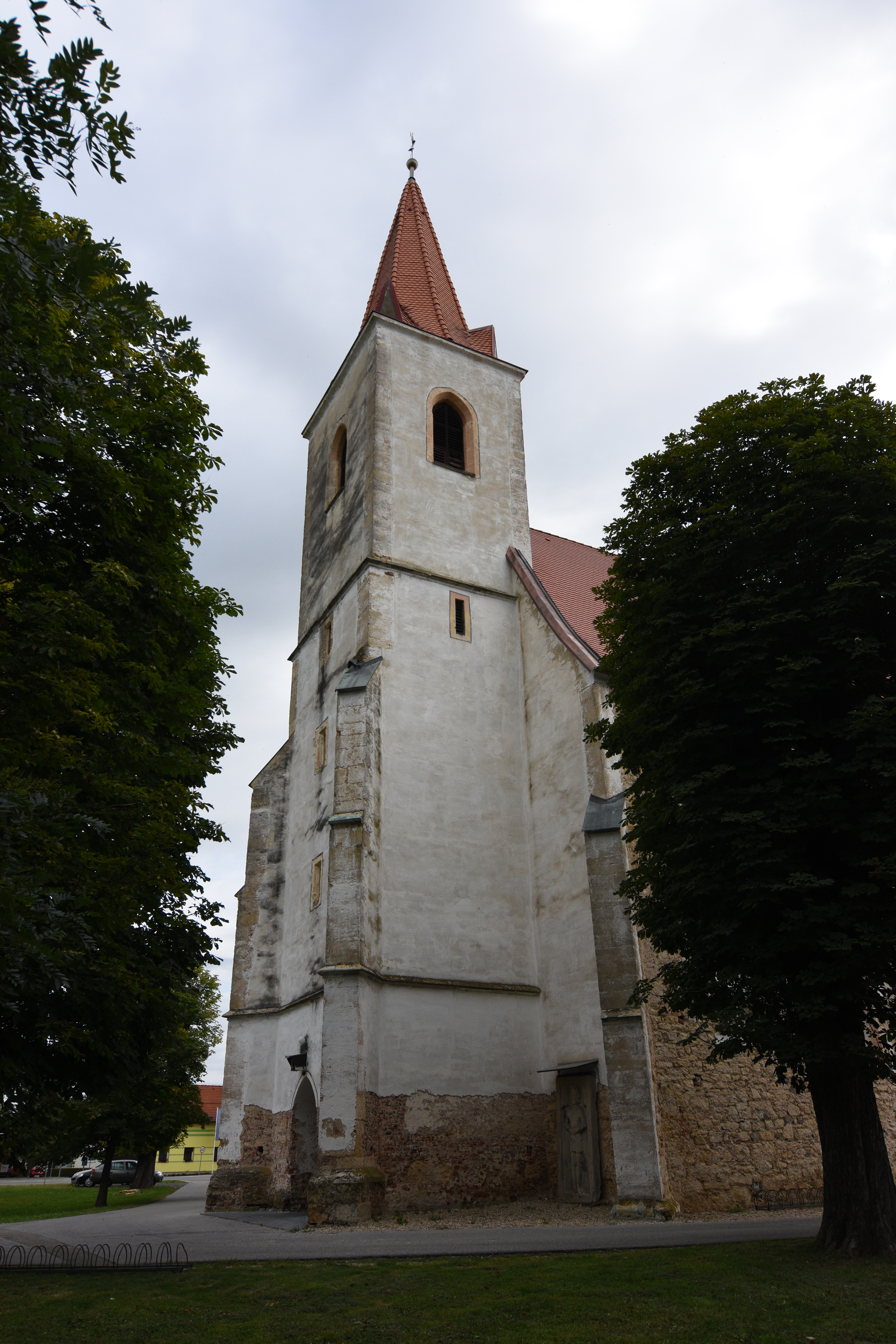 Nativity of Mary church Tišina